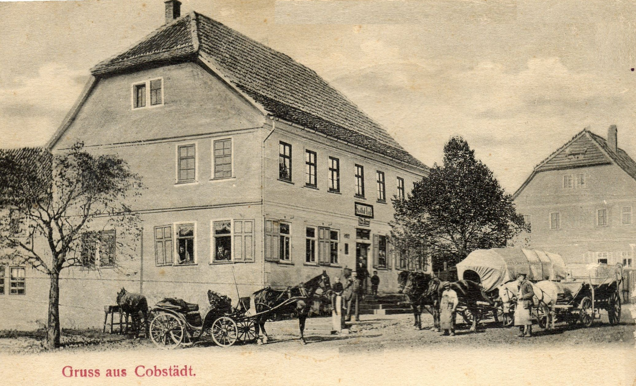 Cobstädt, Reproduktion einer Ansichtskarte aus den 1950ern